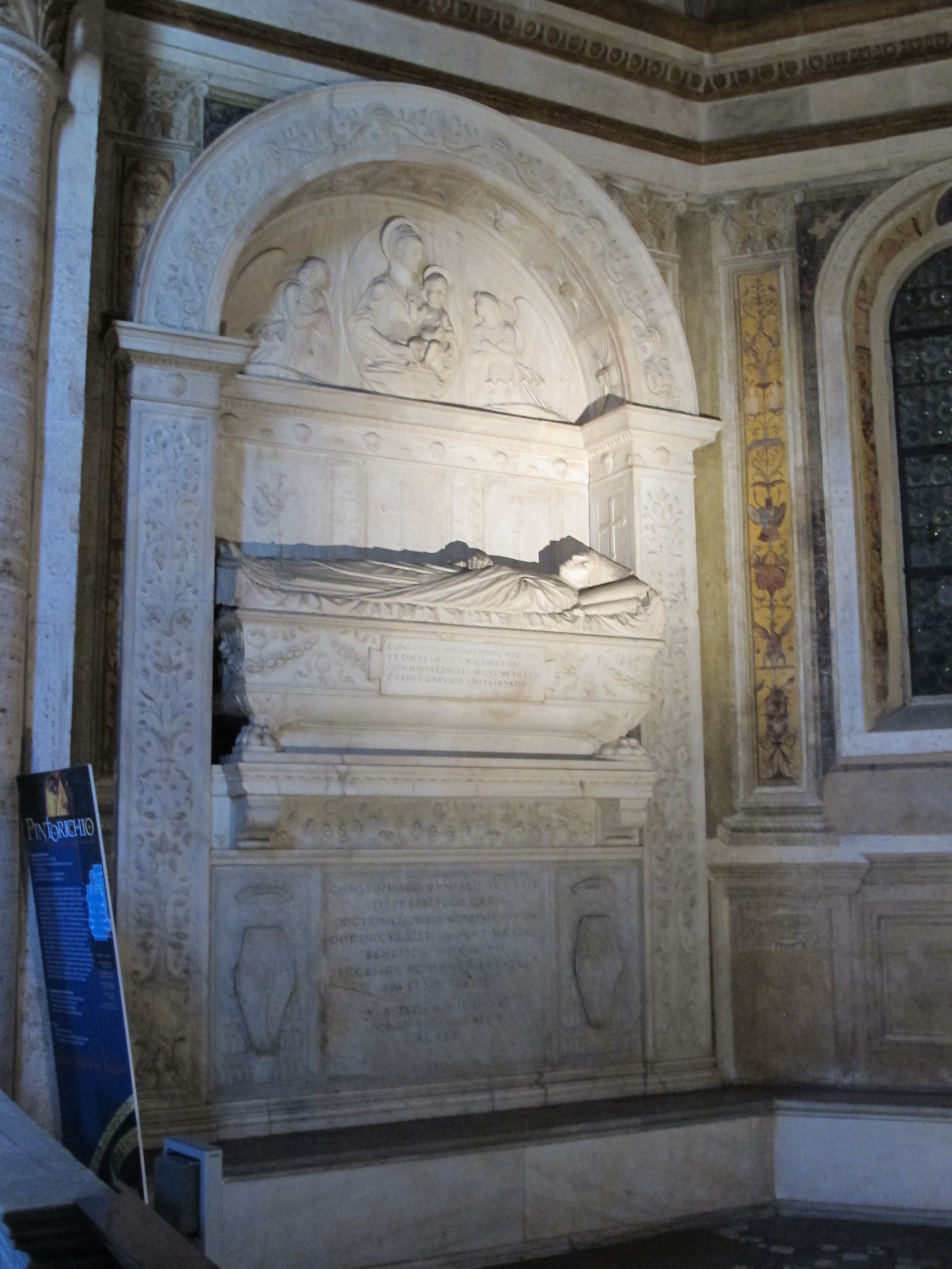 Monument of Cristoforo and Domenico della Rovere in Santa Maria del Popolo by Andrea Bregno and Mino da Fiesole